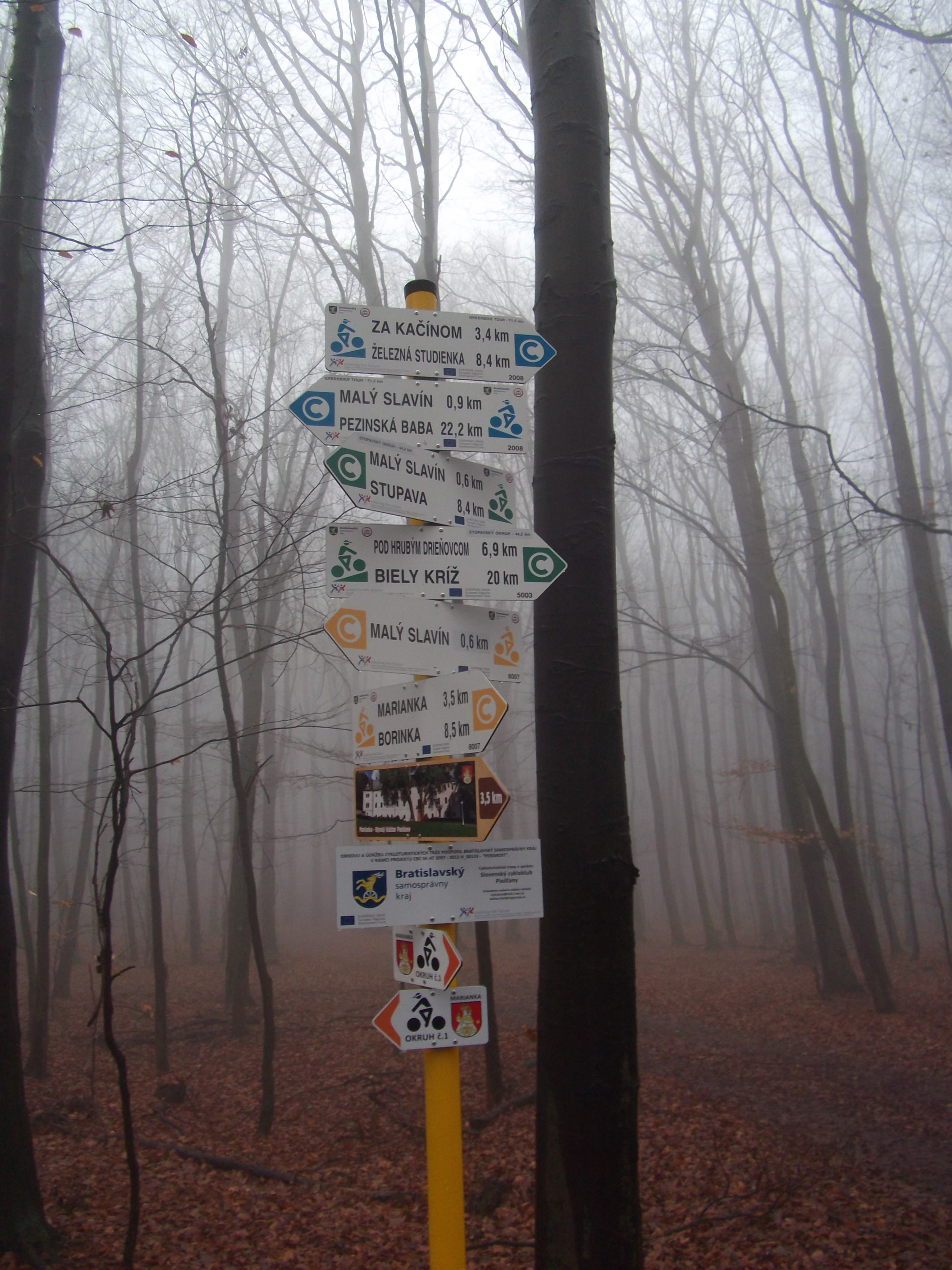 Rázcestie cykloturistických trás na Malinskom vrchu.